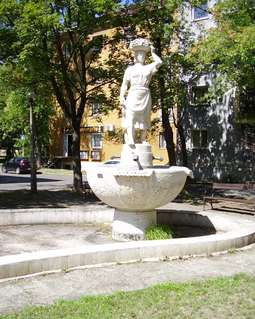 Ohmann Béla: Szüret (1957) (mészkőszobor, kútszobor, szökőkút, Szocialista realista (1949-58)). - Kazincbarcika, Egressy út.